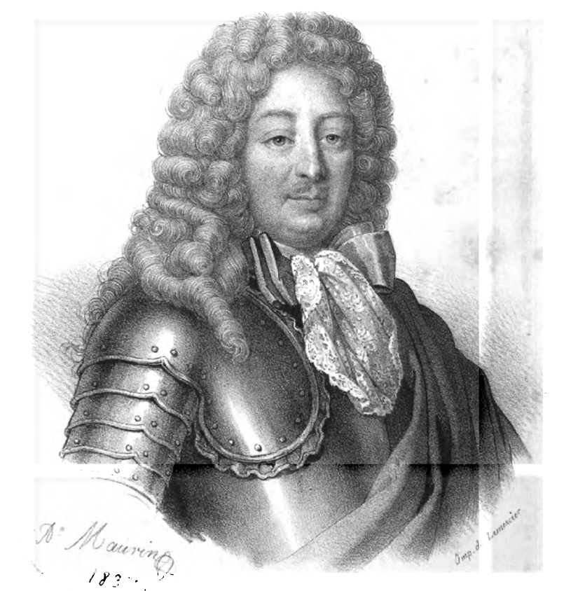 Louis Victor de Rochechouart, Duke of Mortemart